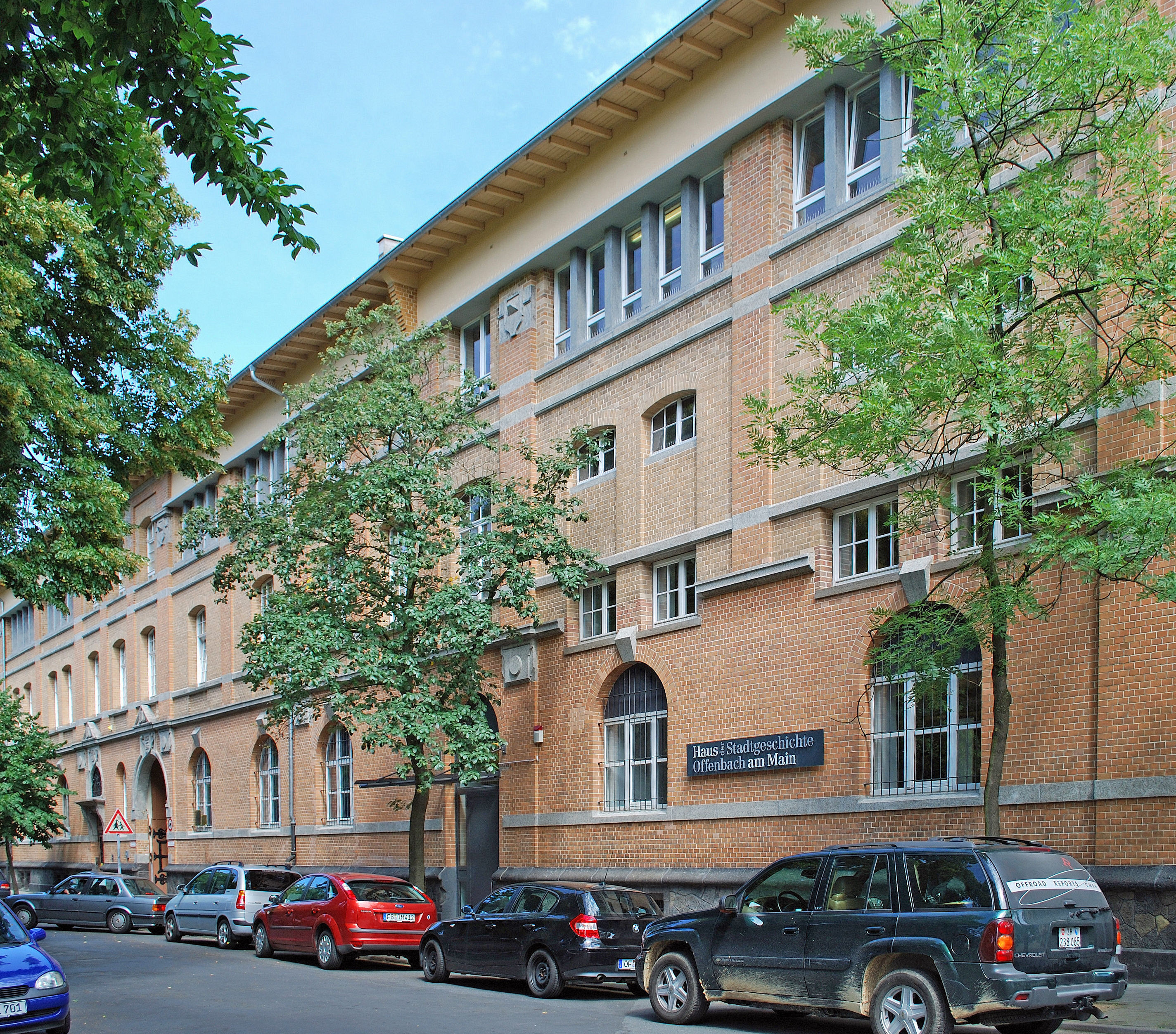 Haus der Stadtgeschichte - Museum und Archiv im Bernardbau in Offenbach am Main